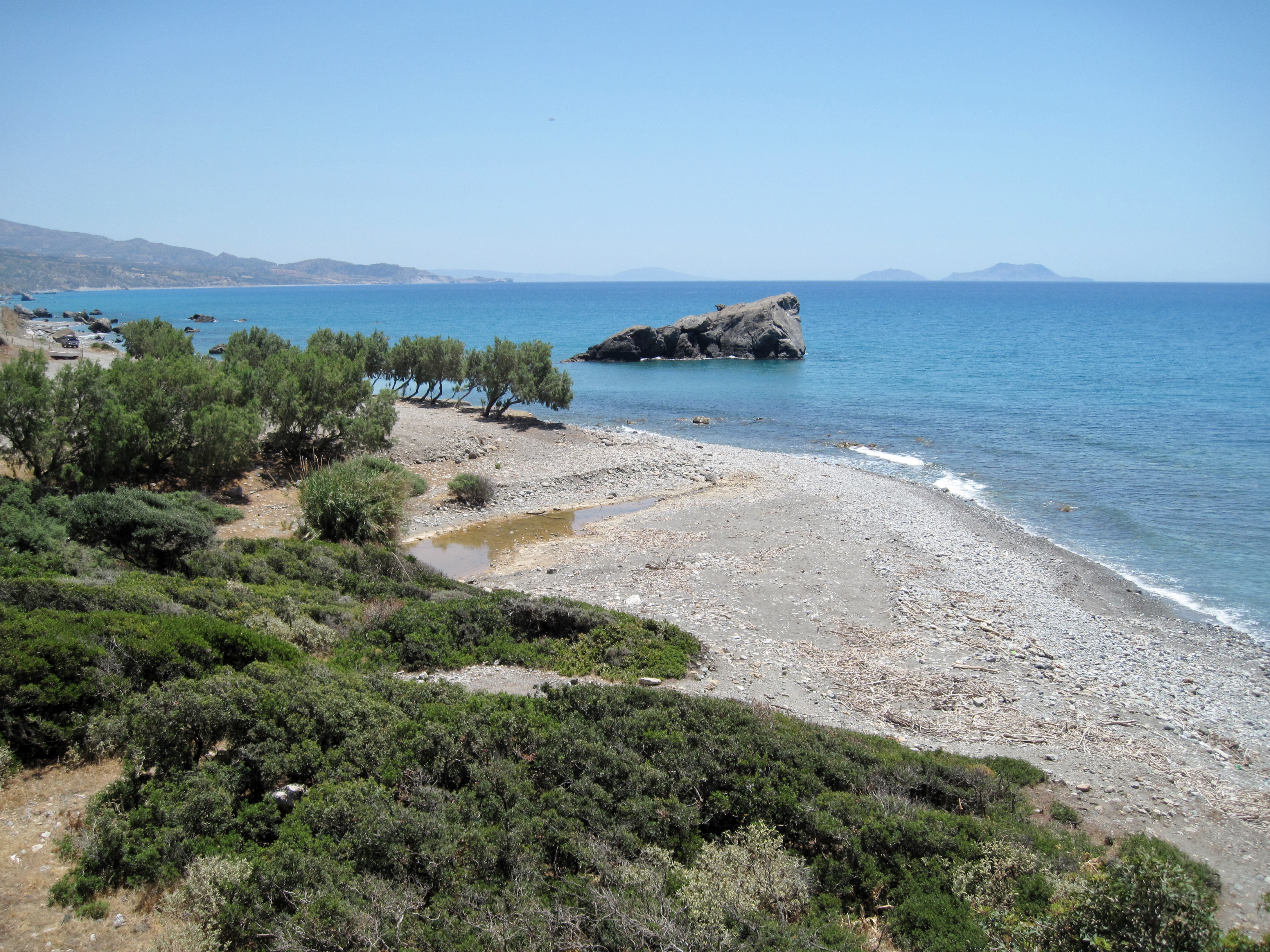 Drymiskiano Ammoudi („Sandstrand von Drymiskos“), Gemeinde Finikas, Präfektur Rethymno, Kreta, Griechenland